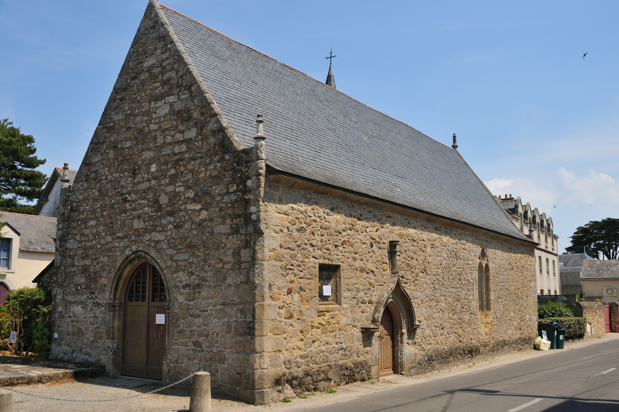 Chapelle de Penchâteau, Le Pouliguen, Loire-Atlantique, France